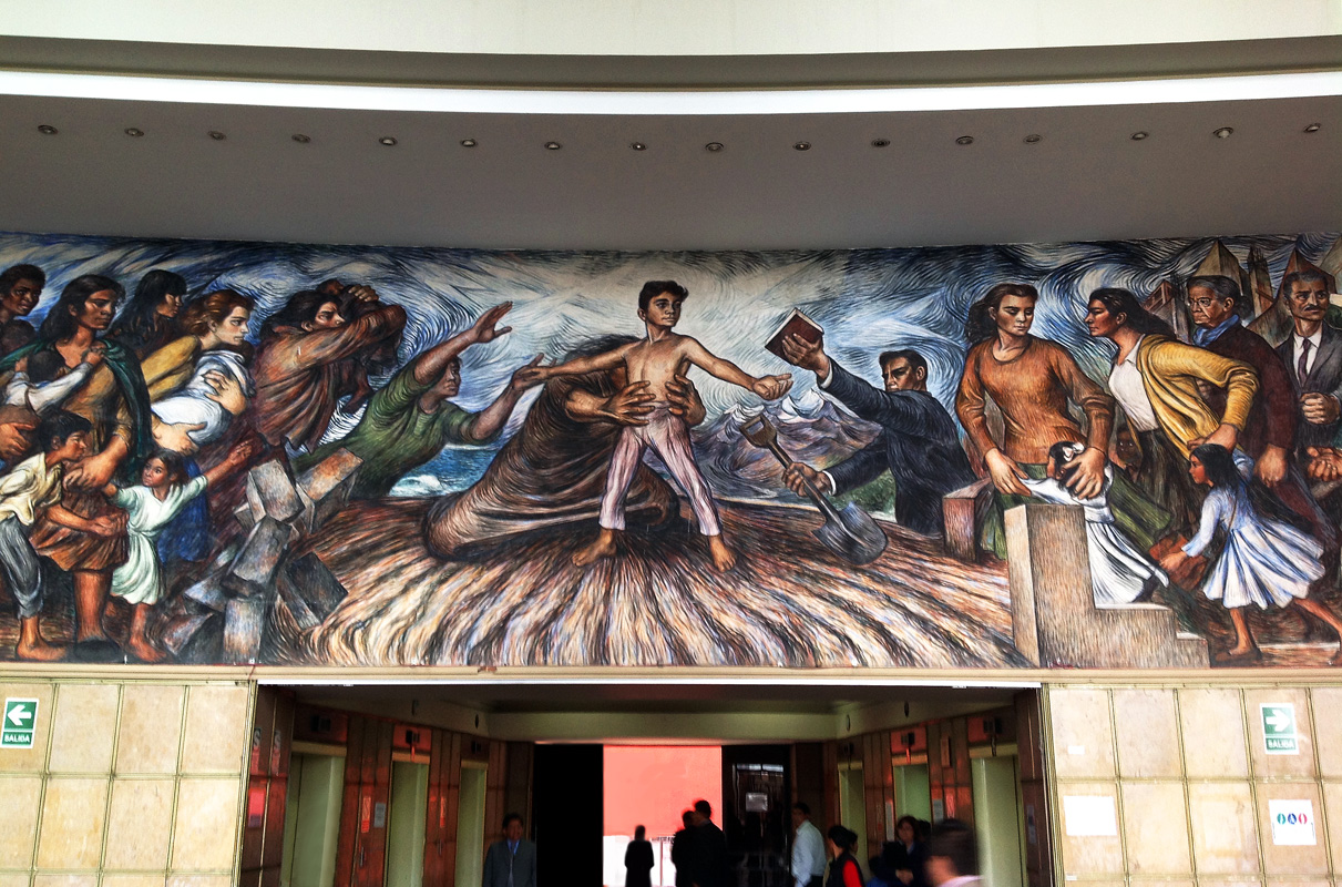 La historia de la educación en el Perú, detalle central. El mural total mide 3.10 m x 35.00 m